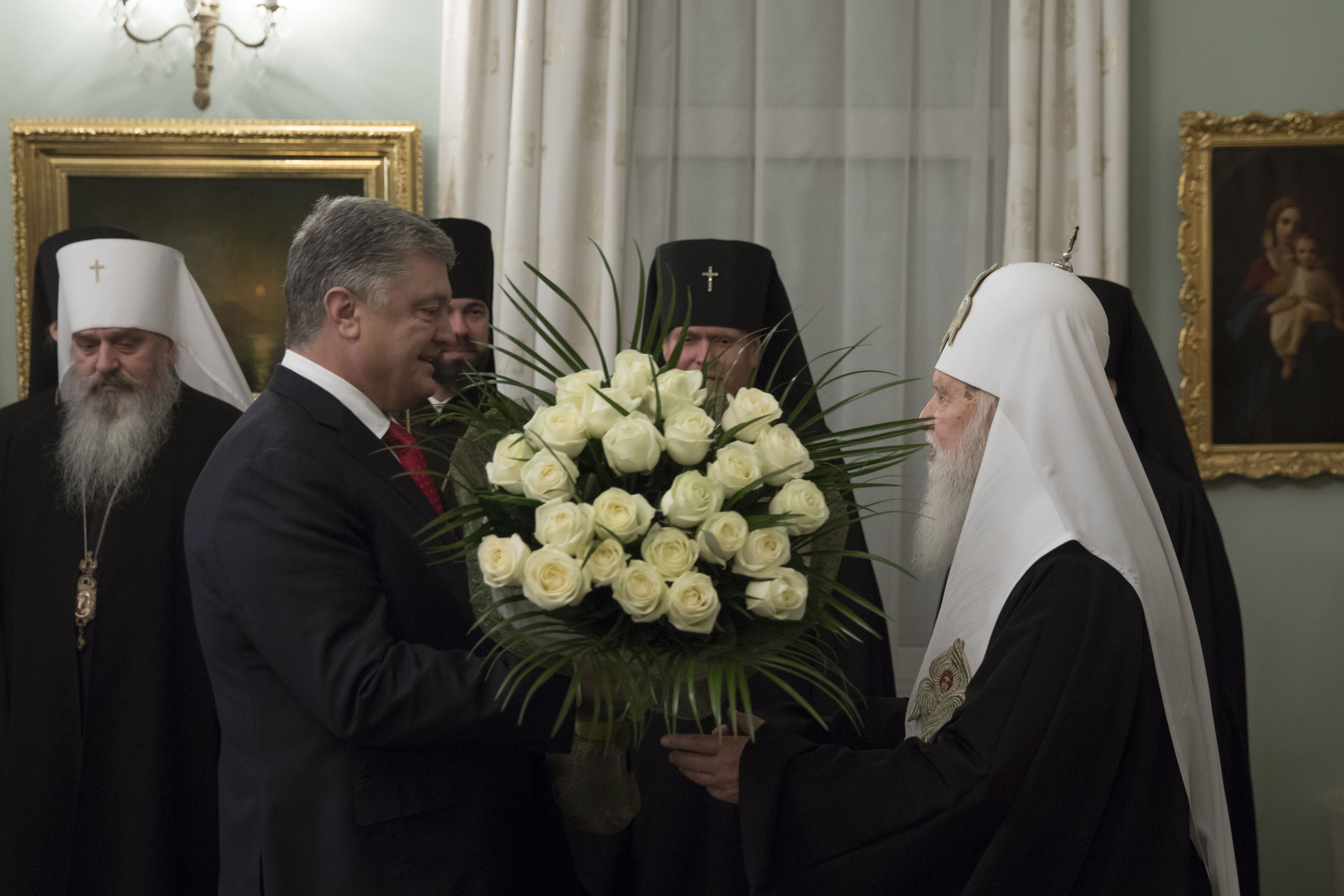 Президент привітав Патріарха Філарета з 23-річчям інтронізації